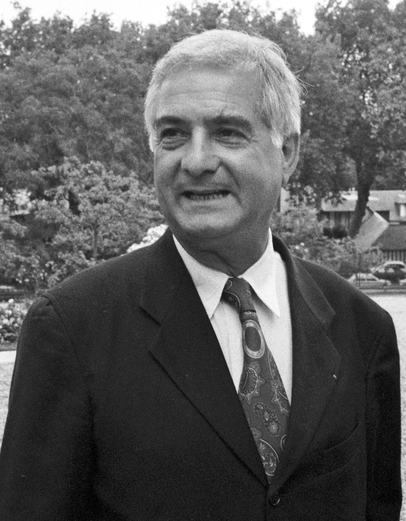 L'acteur français Jean-Claude Brialy à Deauville (Normandie, France) en 1992.